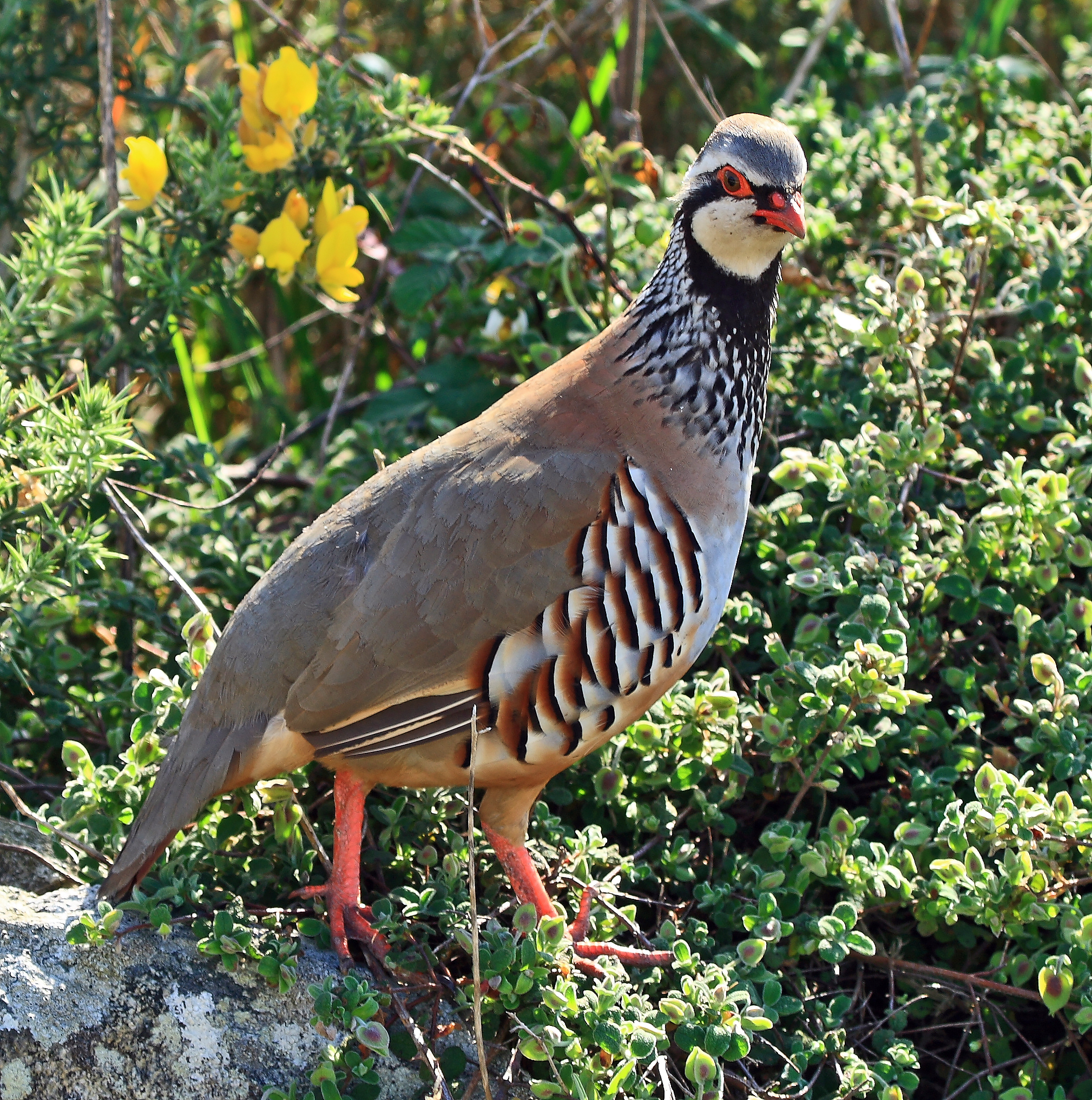 Alectoris rufa, Espineirido, Galicia, Spain